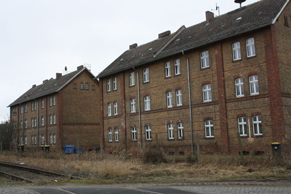 Wriezen, Frankfurter Straße 30/31